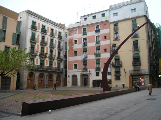 El Fossar de les moreres - Barcelona, Catalunya, Vista general